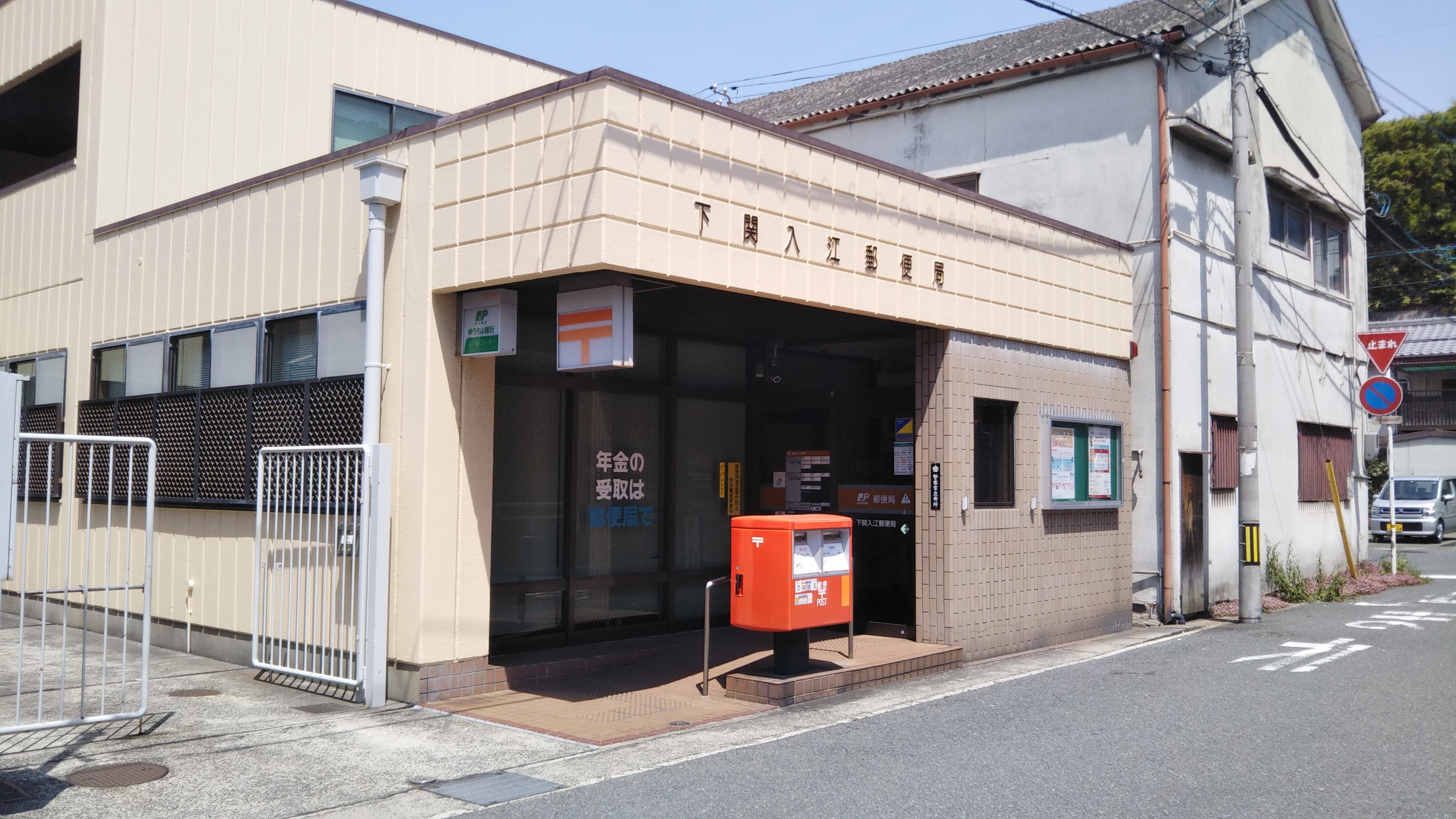 下関市入江郵便局。2019/05/04に入江町で撮影。